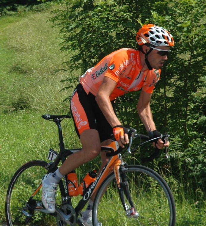 Samuel Sánchez (Euskal Bizikleta 2007)